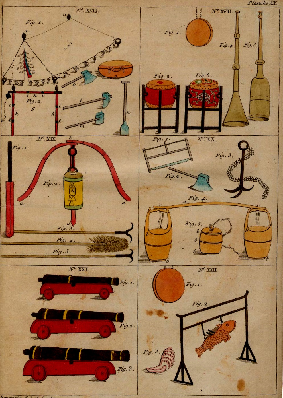 Jean Joseph Marie Amiot (1718-1793) Art militaire des Chinois című könyvének egyik illusztrált oldala